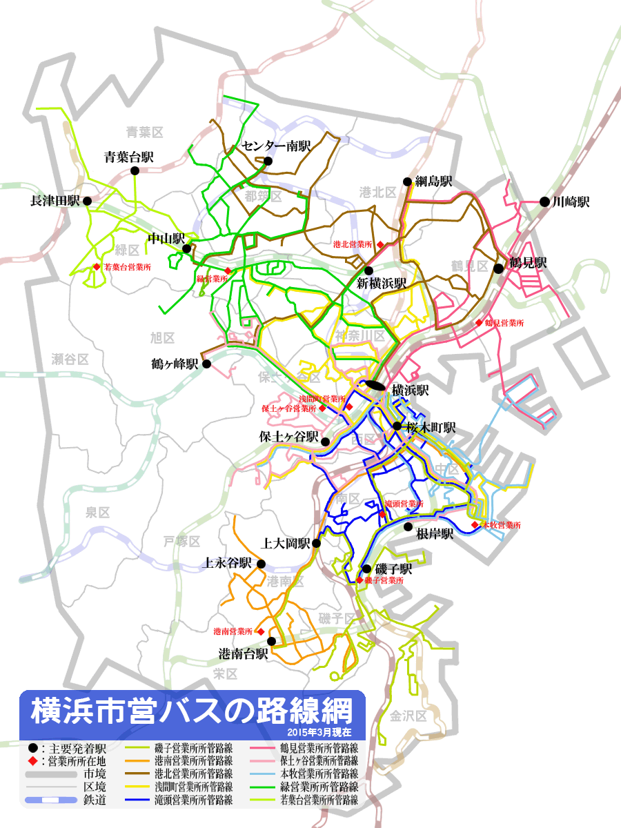 Map of Yokohama municipal bus routes, Yokohama, Japan